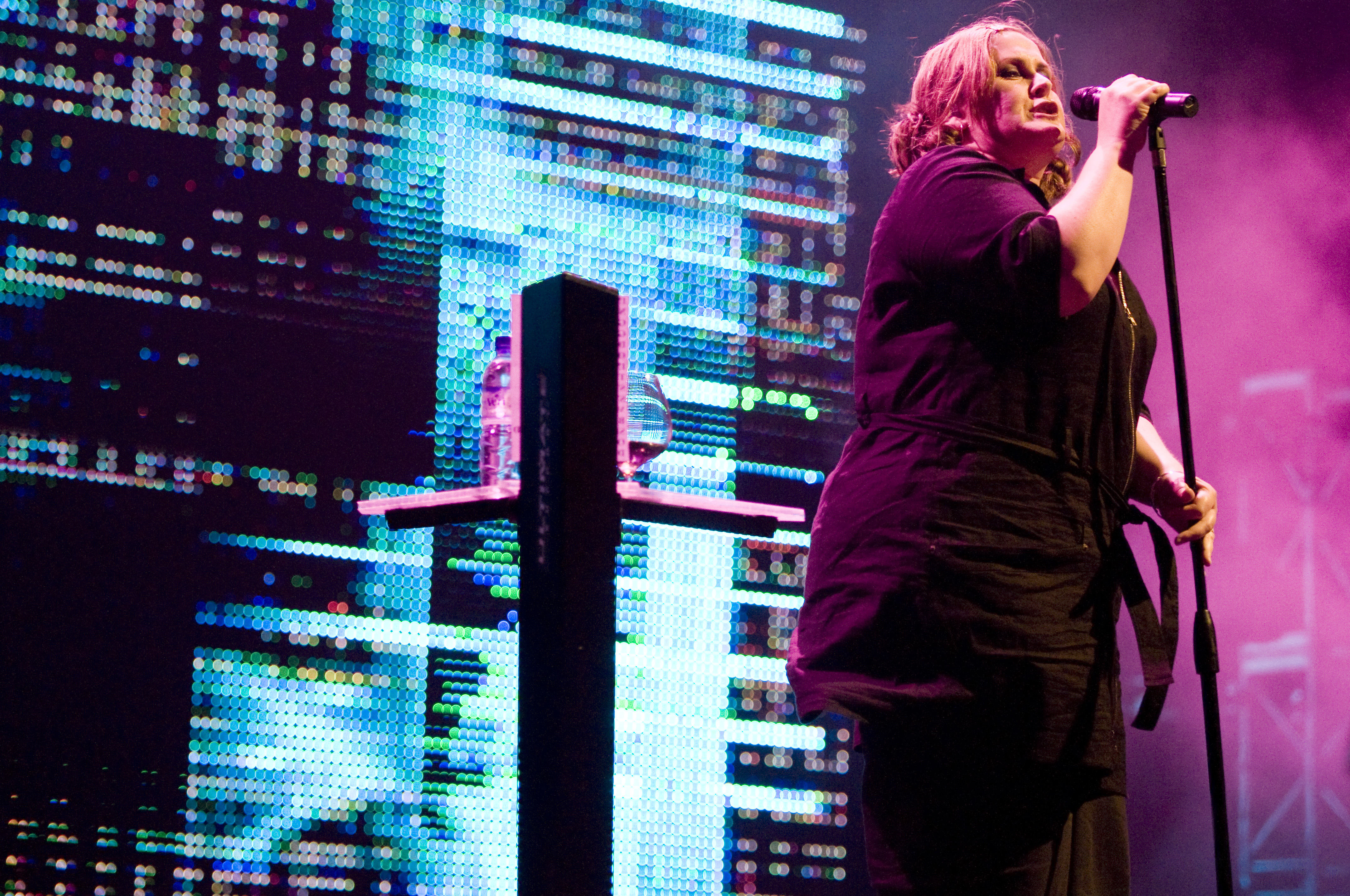 Yazoo (band)